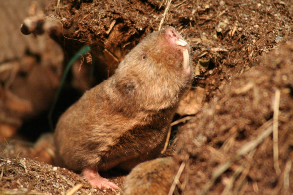 Sambischer Kleingraumull (Ansell-Graumull) (Cryptomys anselli) im Zoo Leipzig